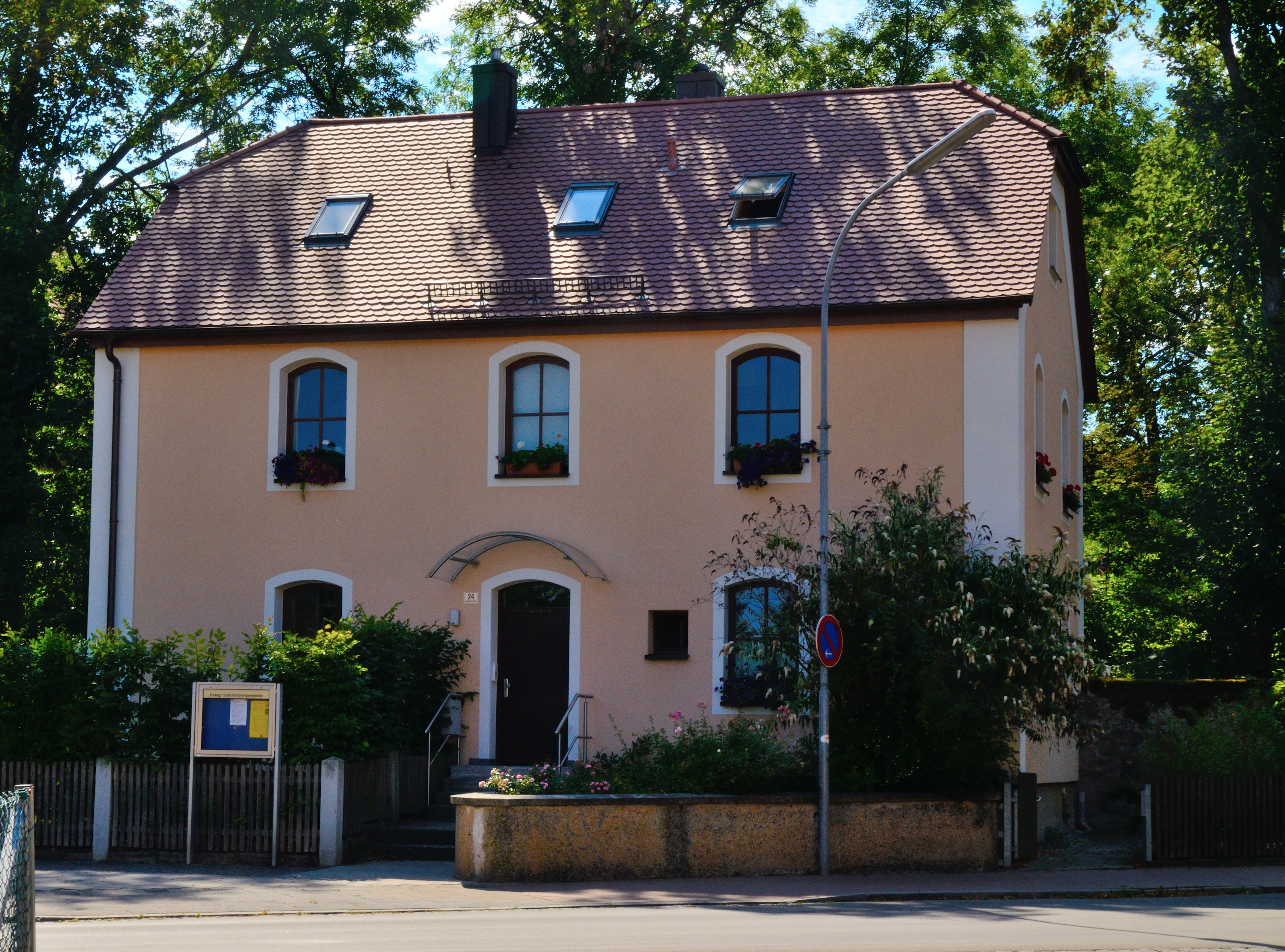 Ehemaliges Mesnerhaus der St. Nikolaigemeinde in Neuendettelsau